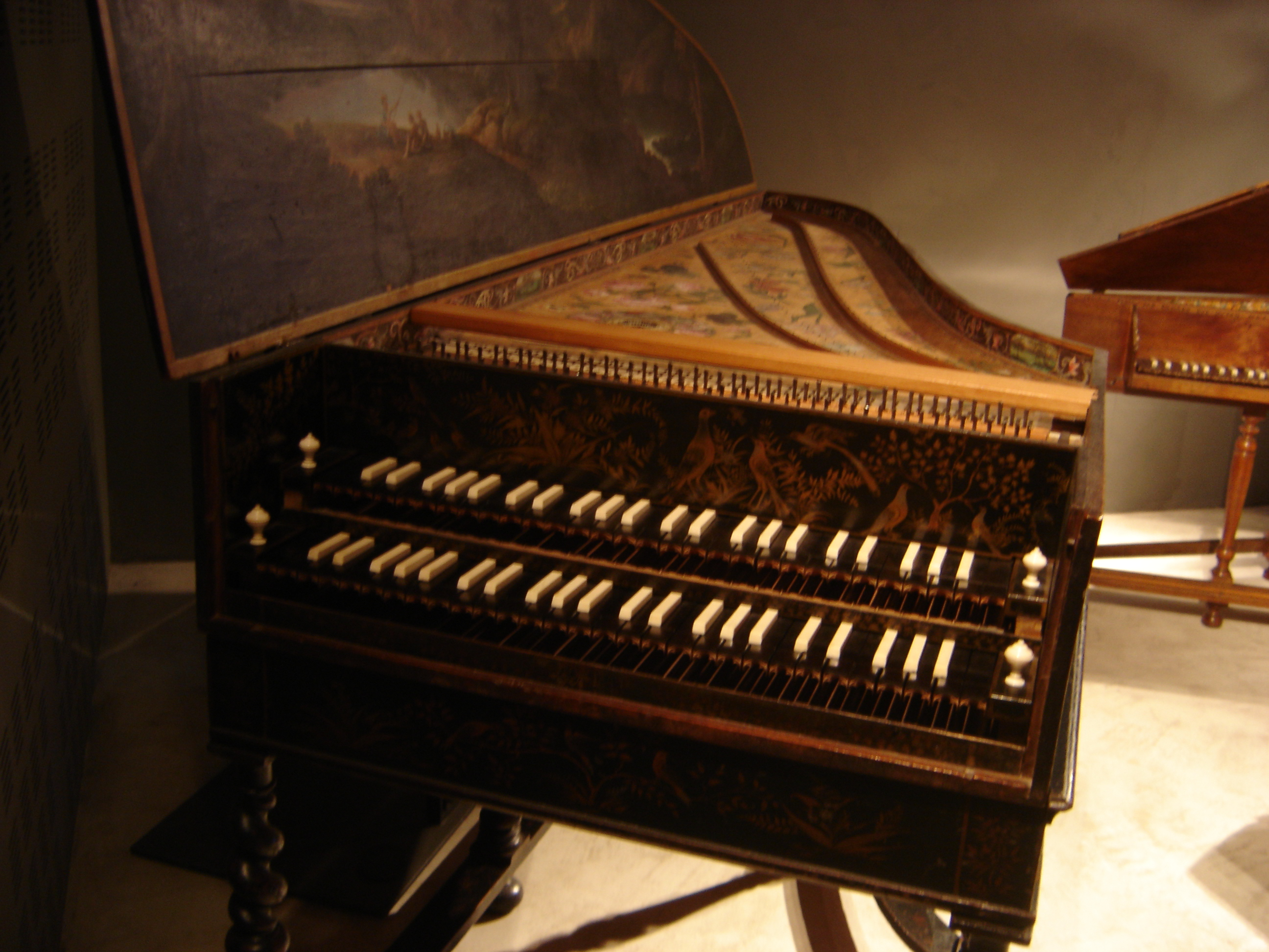 Détail du clavecin français anonyme du XVIIe siècle - Paris, Musée de la Musique